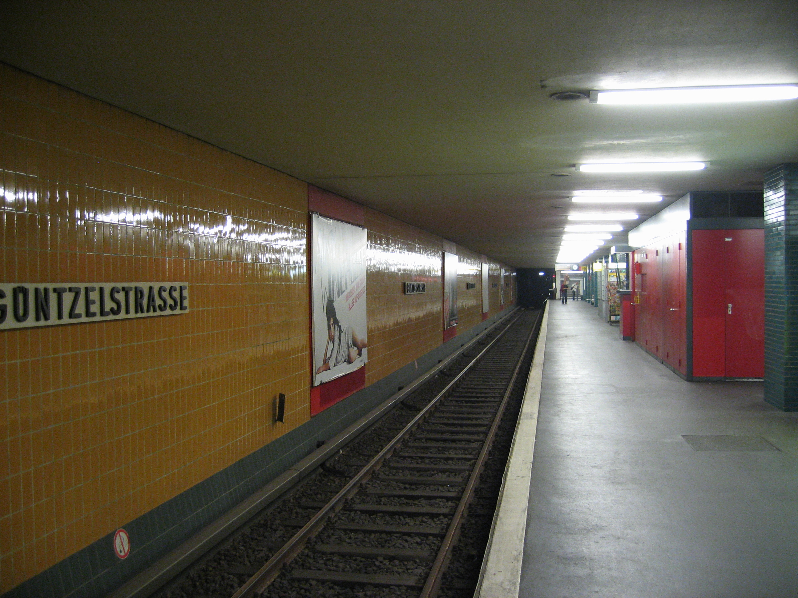 U-Bahnhof Güntzelstraße, Berlin